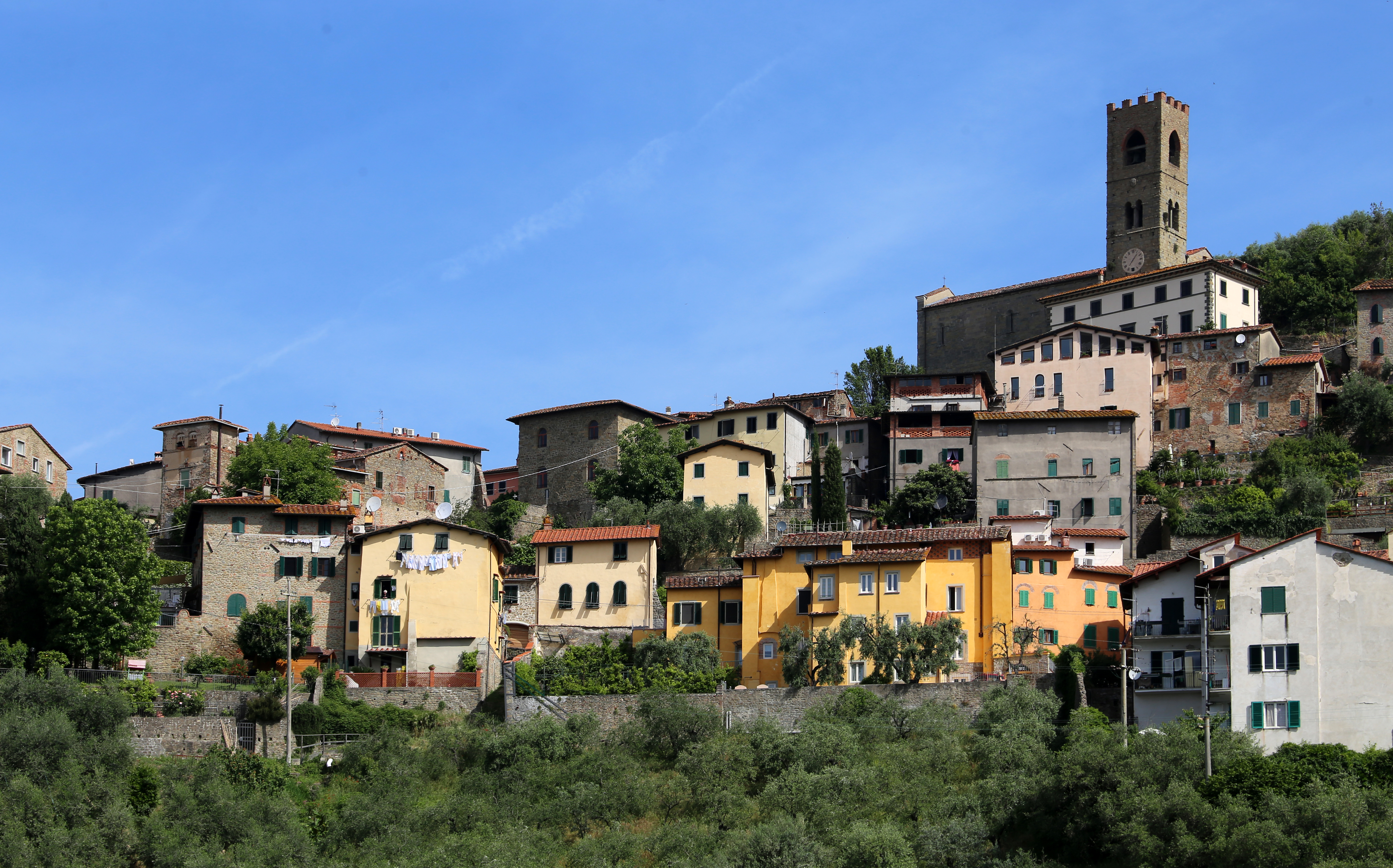 mura di Uzzano This is a photo of a monument which is part of cultural heritage of Italy.